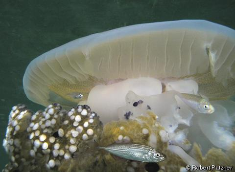 Das Bild zeigt Jungfische von Trachurus mediterraneus, die sich im Schutz einer Spiegeleiqualle (Cotylorhiza tuberculata) aufhalten